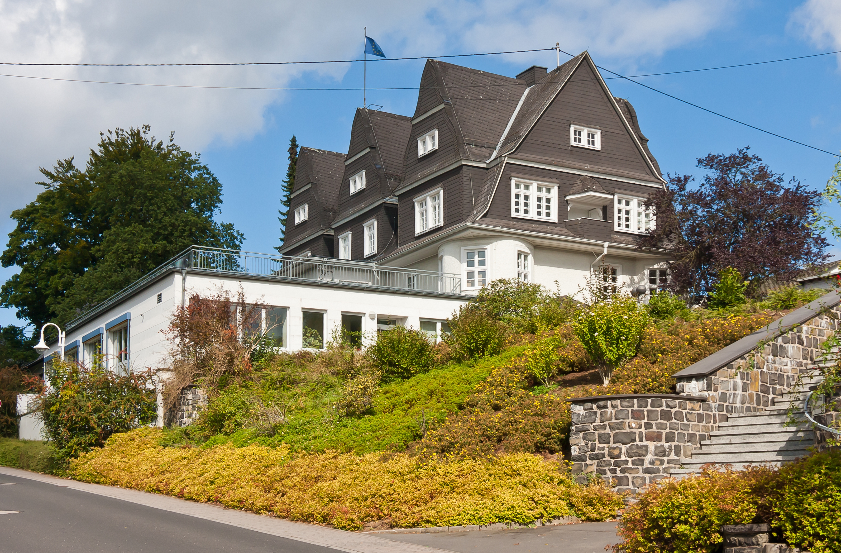 Europa-Haus Bad Marienberg - denkmalgeschützte Villa